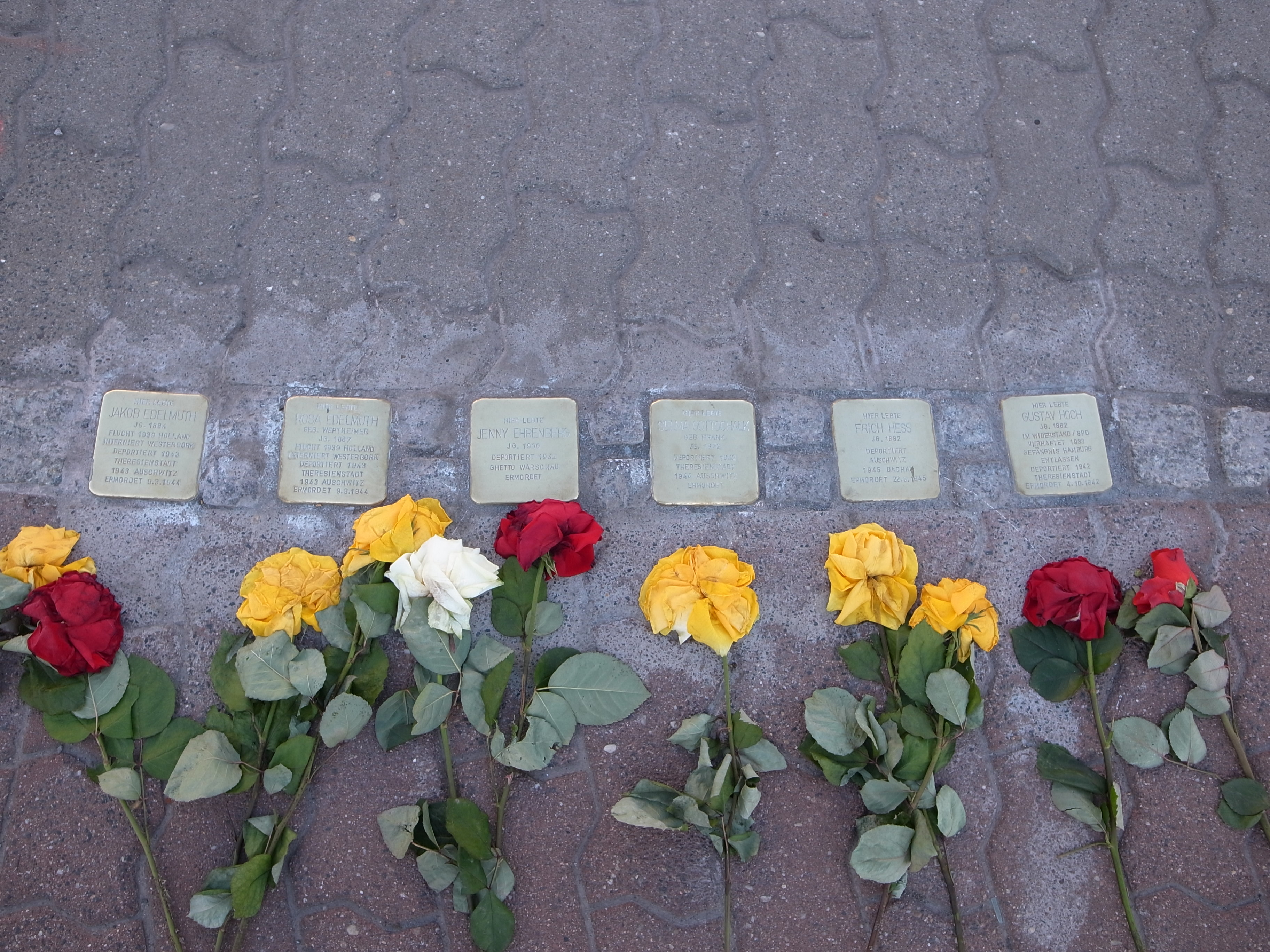 Dessau,6 Stolpersteine an der Ecke Franzstraße, Askanische Straße (Museumskreuzung) für Jakob Edelmuth, Rosa Edelmuth, Jenny Ehrenberg, Selma Gottschalk, Erich Hess, Gustav Hoch